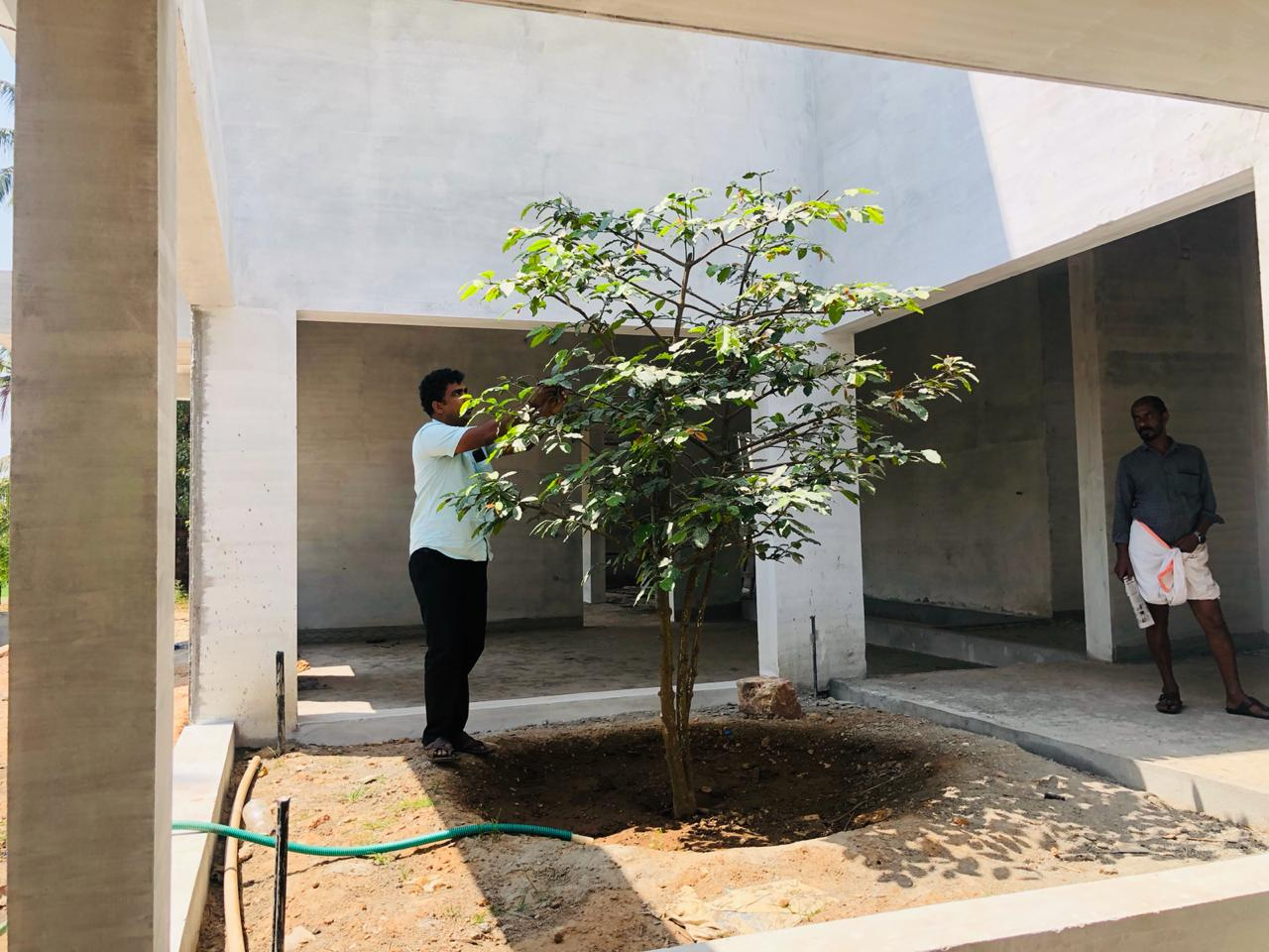 പറിച്ചു നട്ട മരത്തെ ശുശ്രൂഷിക്കുന്നു.